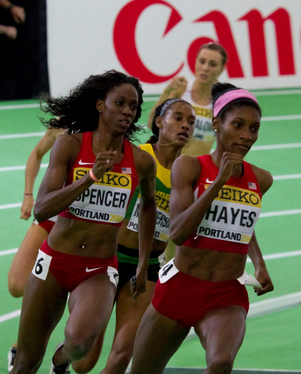 470 finale 400m dames